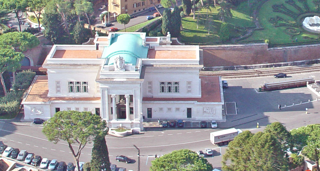 Bahnhof des Vatikans, fotografiert von der Kuppel des Petersdomes im November 2003 durch Walter Hochauer